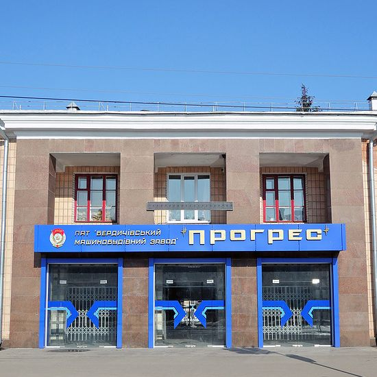 ОАО "БМЗ "Прогресс"